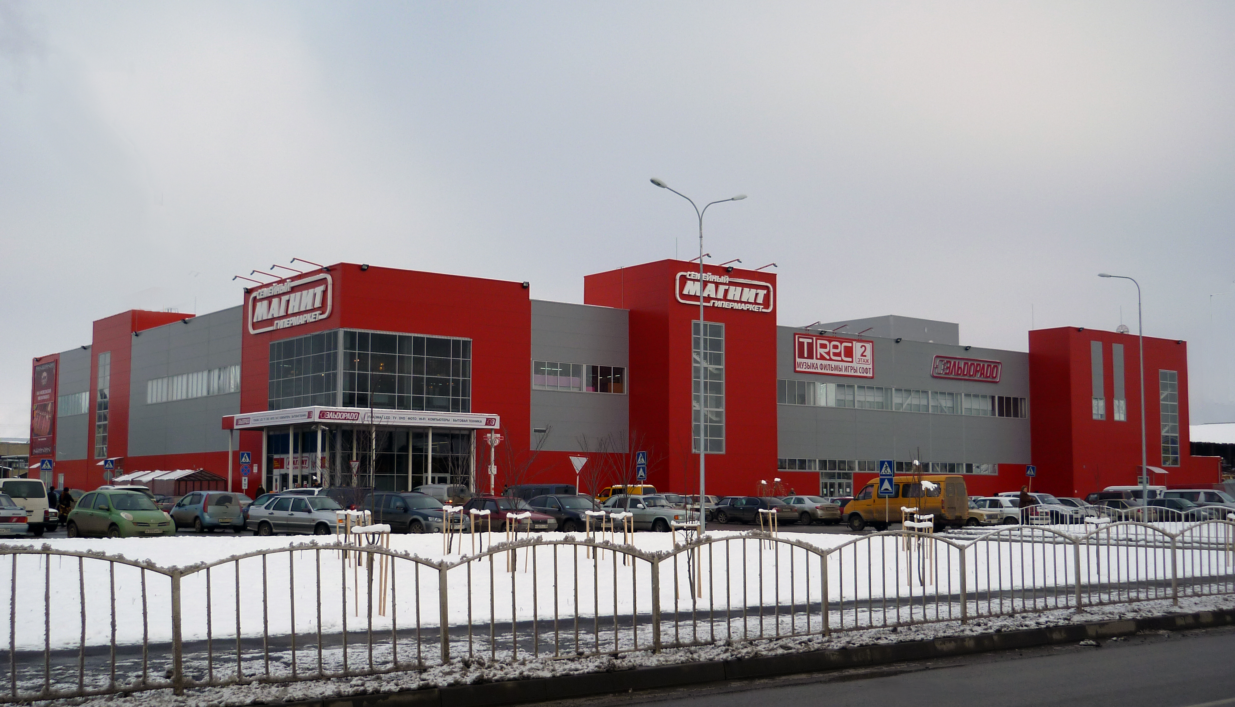 Гипермаркет «Магнит» в Армавир Адрес Краснодарский край, г. Армавир, ул. Энгельса, 57/2